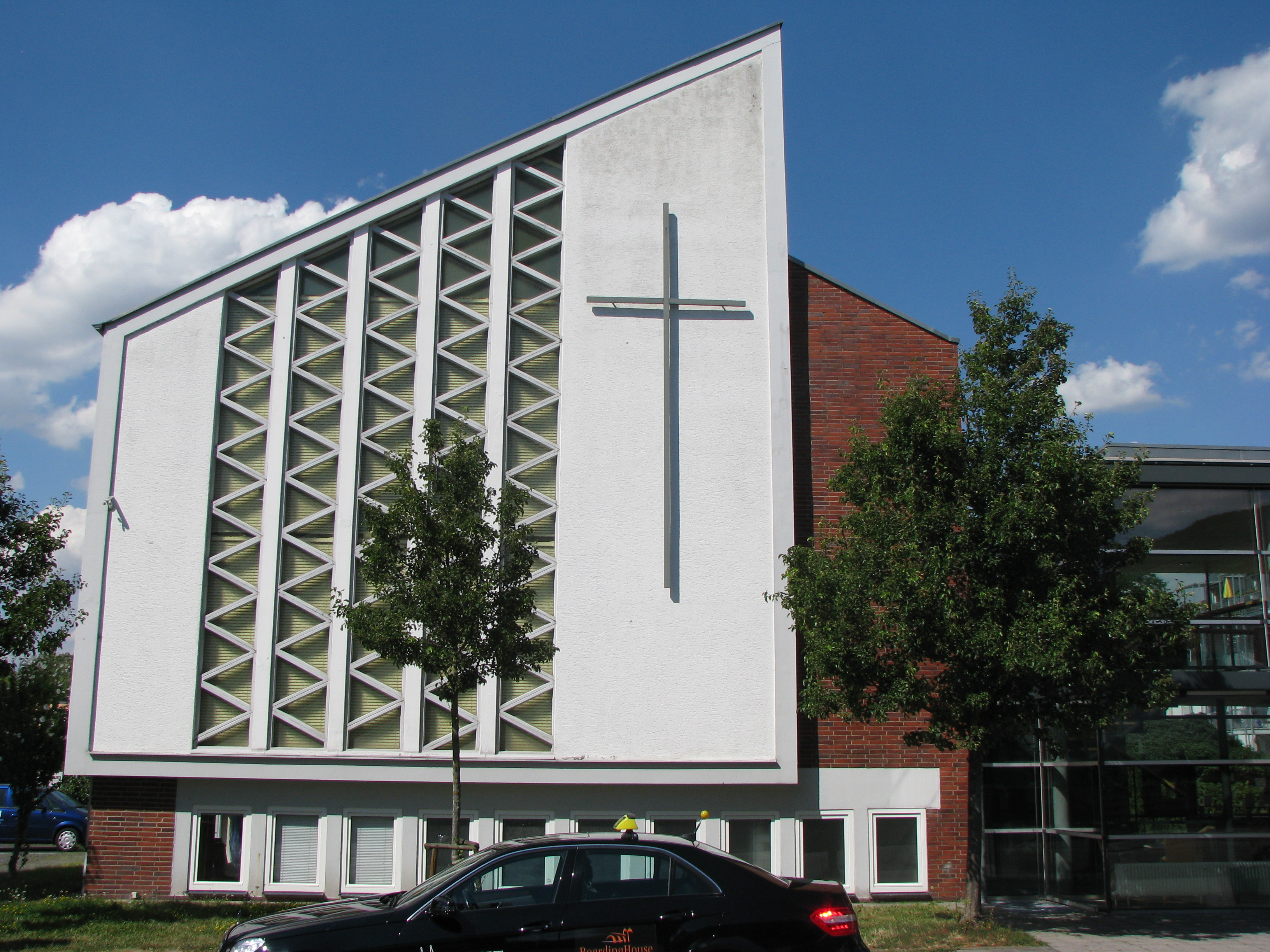 Baptistische Hoffnungskirche in der Heidelberger Südstadt